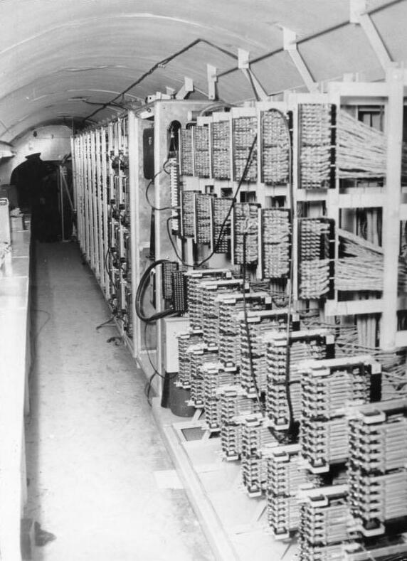 Zentralbild/Junge 24.4.1956 USA-Spionage Tunnel unter DDR-Gebiet Der amtierende Militärkommandant des sowjetischen Sektors von Berlin, Oberst Kozjuba, gab am Montagabend (23.4.56) auf einer Pressekonferenz vor zahlreichen in- und ausländischen Journalisten bekannt, dass am 22.4.1956 von sowjetischen Truppen eine amerikanische Abhörzentrale im demokratischen Sektor Berlins ausgehoben wurde. Amerikanische Stellen hatten im Gebiet von Alt-Glienicke einen etwa 300 m langen Stollen angelegt, der zu den Fernmeldelinien der sowjetischen Truppen sowie zu den Fernmeldelinien der Deutschen Demokratischen Republik lief. Durch den Stollen ziehen sich Kabelleitungen, die vom amerikanischen Sektor ausgehen und an die Kabelleitungen der sowjetischen Truppen angeschlossen wurden. Im Anschluß an die Pressekonferenz fand eine Besichtigung der amerikanischen Abhörzentrale statt. UBz.: Blick in die Abhörzentrald emit der Verstärkeranlage.